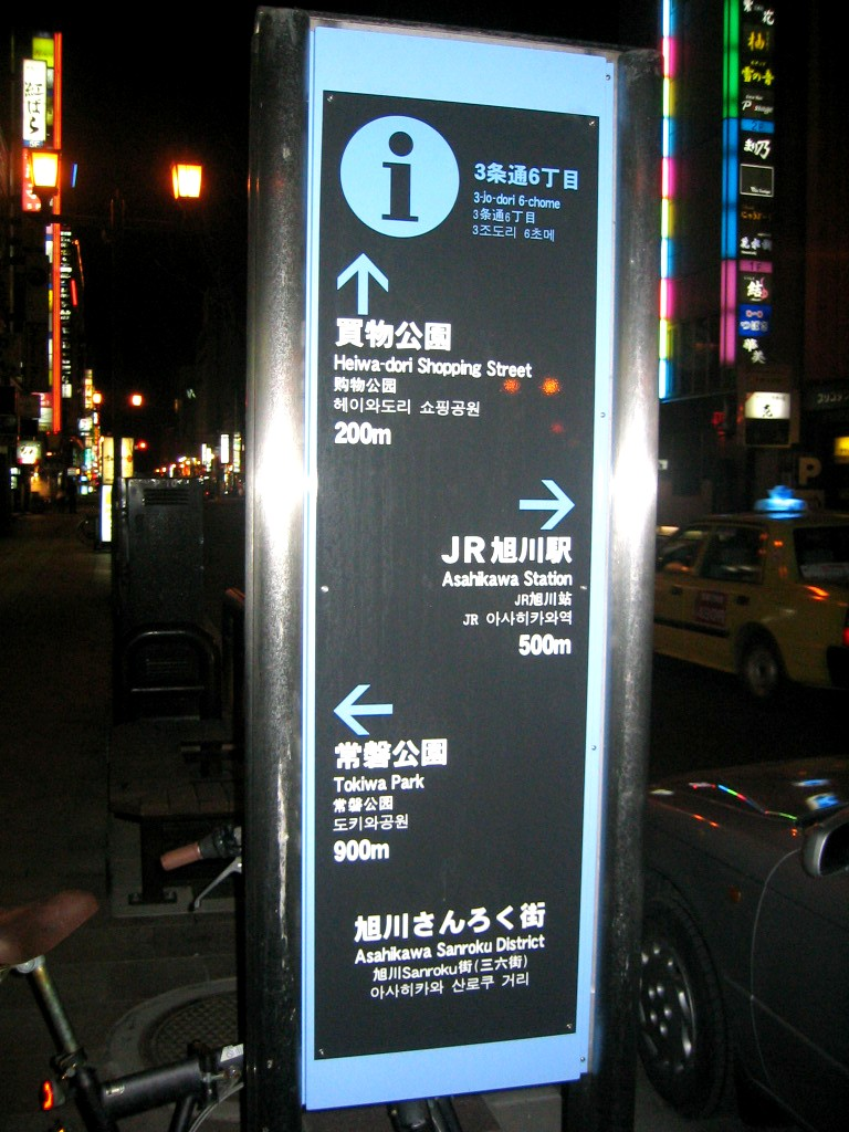 撮影年月日：2010年4月18日